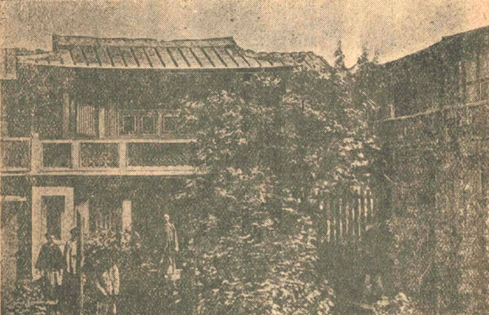 台南市二老口街的許廷光宅邸，其稱為浣紅閣，又被稱為領事府。